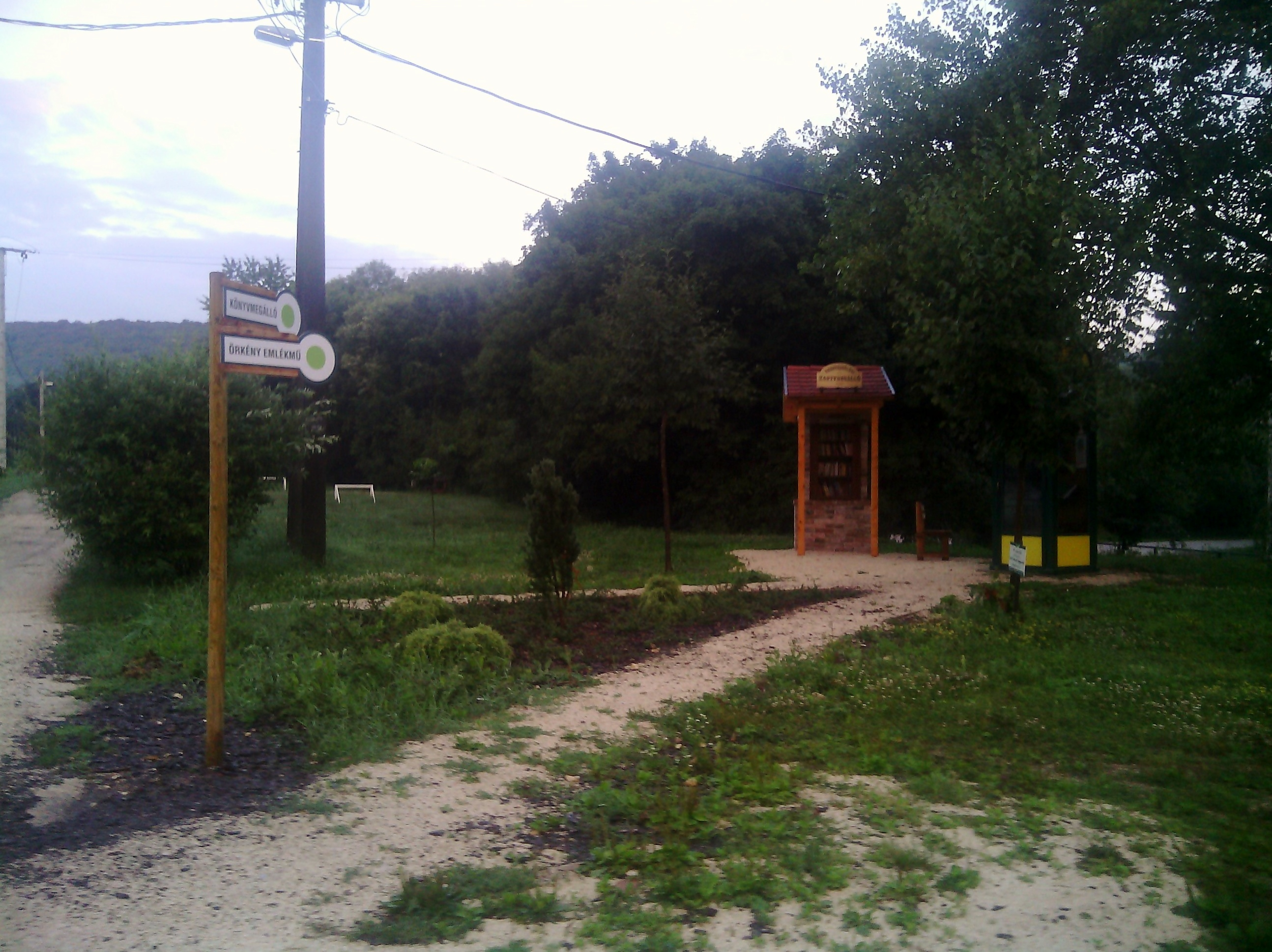 Örkény István emlékműve, Remeteszőlős